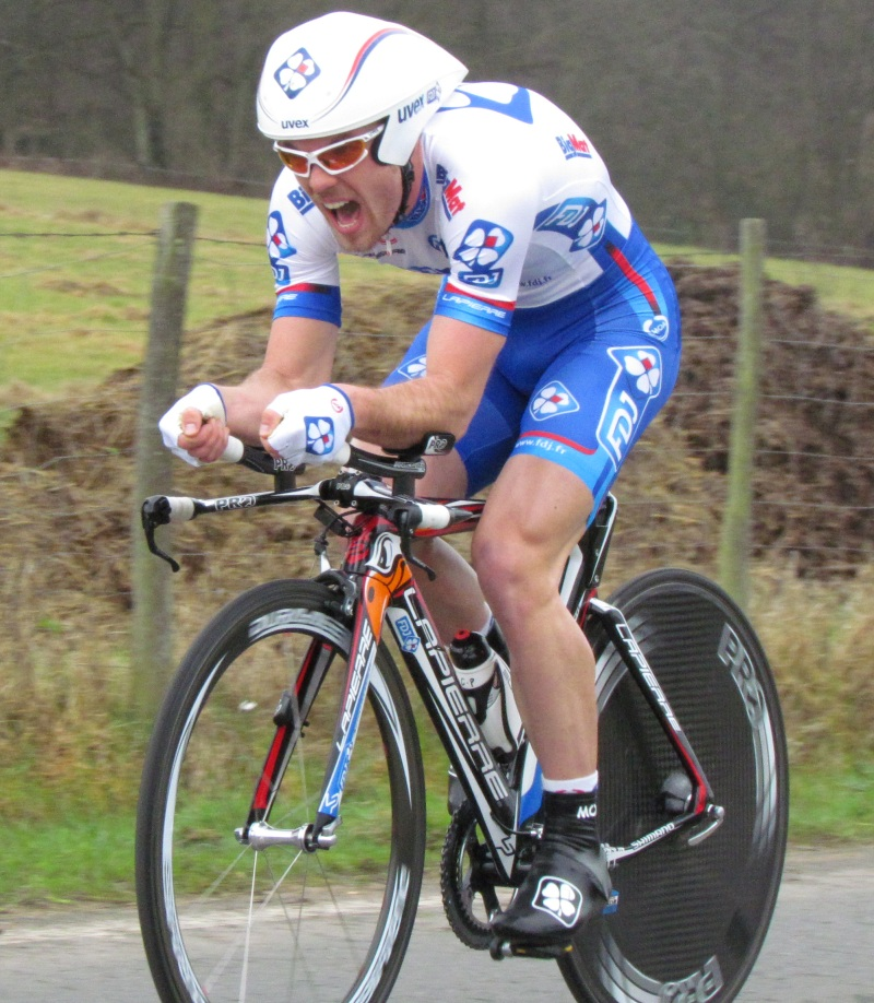 Cedric Pineau